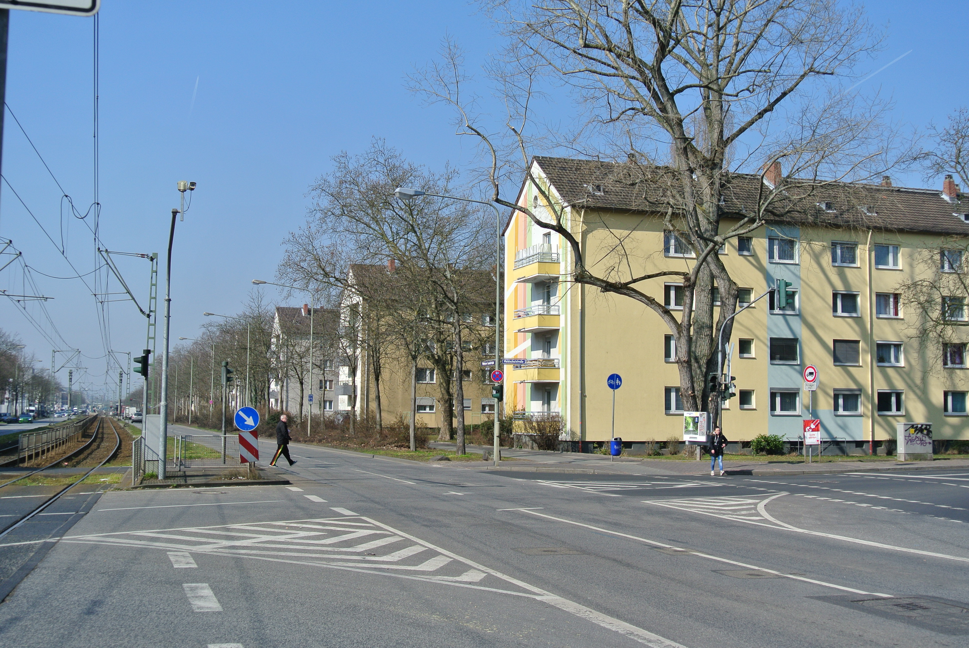 Eduard-Wildermuth-Siedlung in Frankfurt-Griesheim nördlich der Mainzer Landstraße, ab 1950 errichtet, Mainzer Landstraße